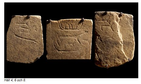 Tre hällar från Sagahjolnshögen